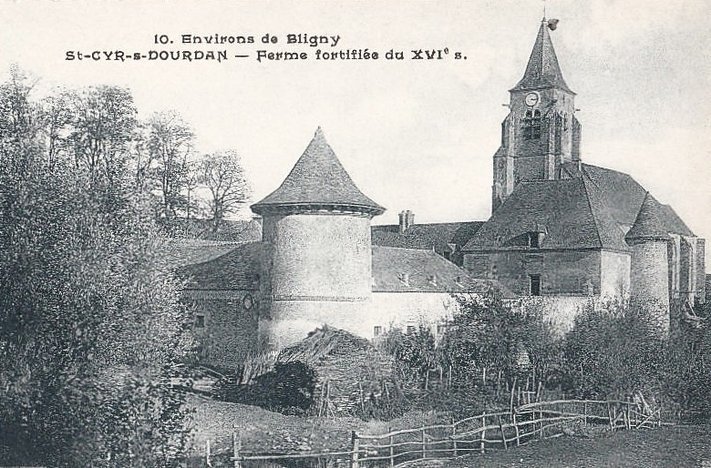 Saint-Cyr-sous-Dourdan ferme fortifiée, XVIe siècle, carte postale ancienne, non grevée de droits.